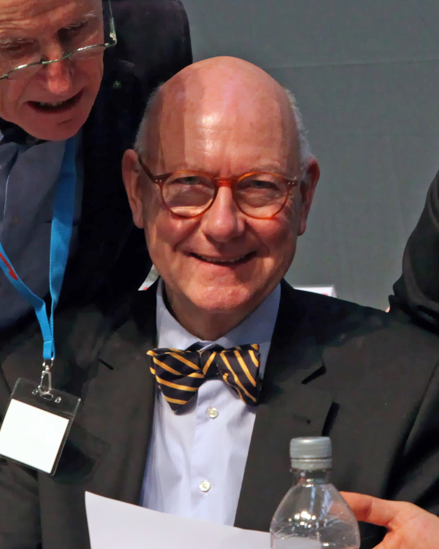 Michael Muster auf der Wahlversammlung am 24.1.2014 in Aschaffenburg